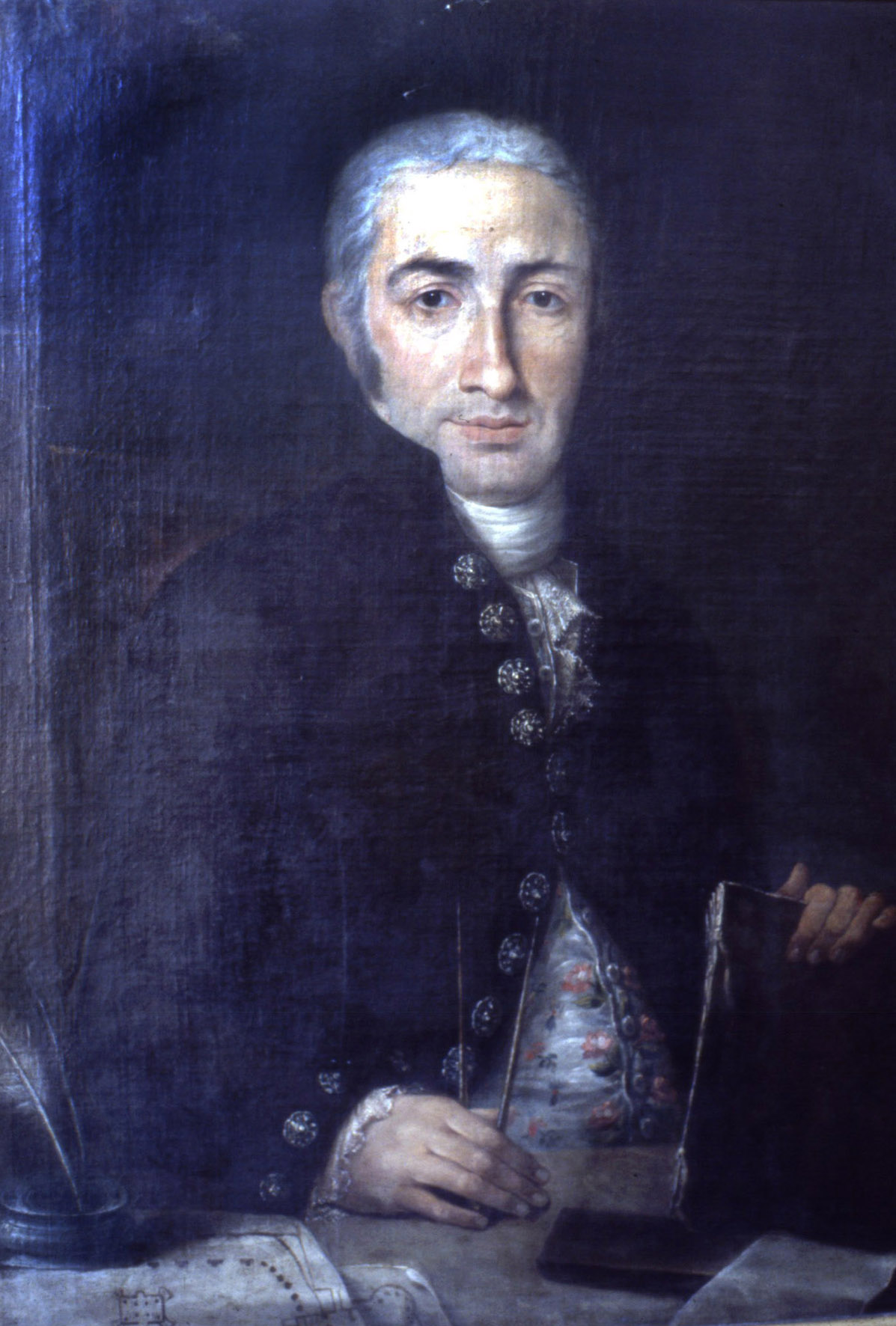 L'arquitecte Joan Soler Faneca, retrat d'autor desconegut, conservat a l'ETSAB (Arranz / Fuguet, 1987, p. 113).